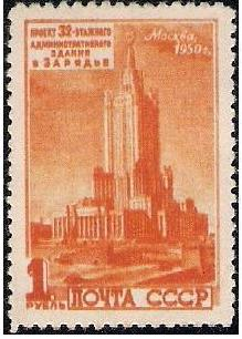 Почтовая марка СССР №1577 Проект здания в Зарядье